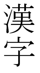 kanji written in japanese kanji